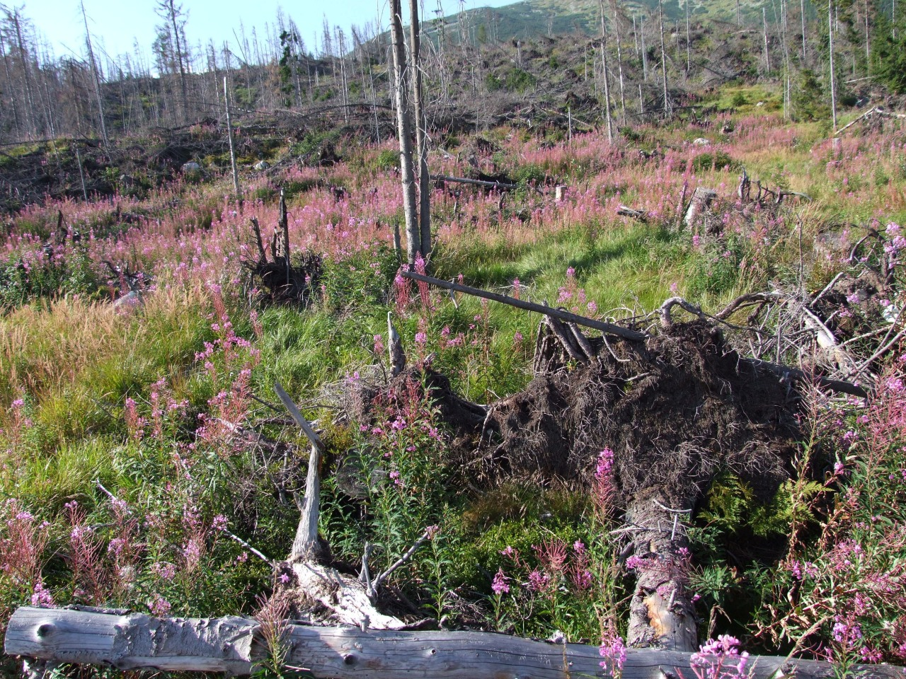 Jamy pod Krywaniem. Skutki wiatrołomów